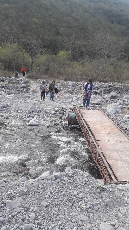 PUENTE RIO GUERRERO (JUJUY) PARA LLEGAR A LA COMUNIDAD "EL ARCA "